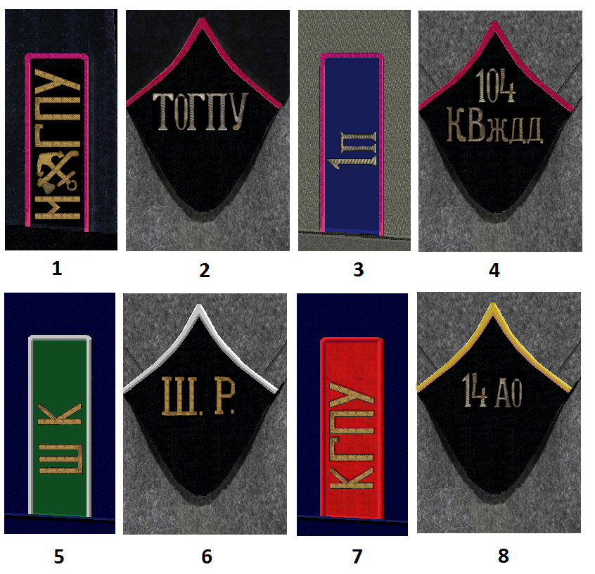 шифровки ГПУ